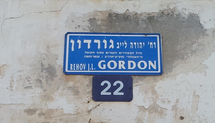 )שלט של רחוב גורדון בתל אביב - בקרן הרחובות גורדון-בן יהודה